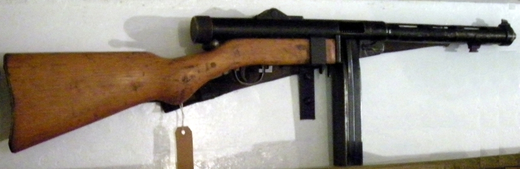 MP 43/44 Suomi Hispano-Suiza (Suisse)